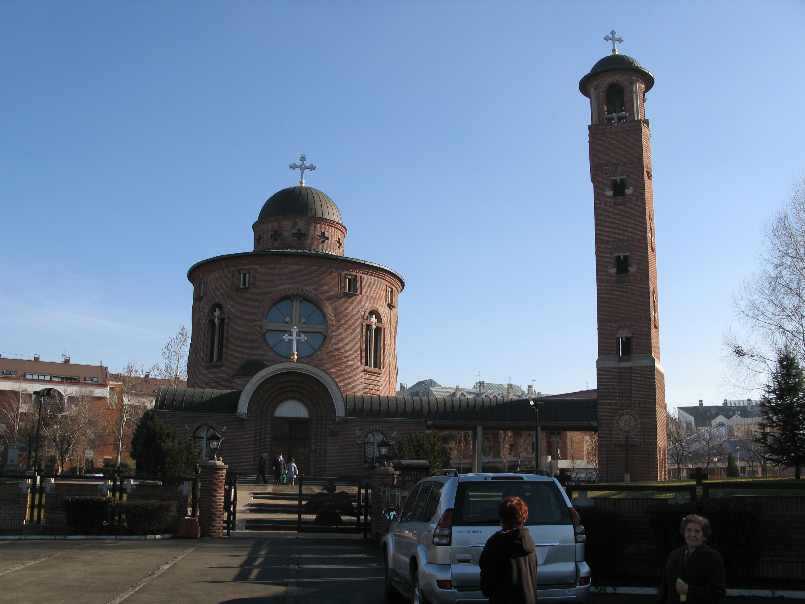 Црква Василија Острошког у Новом Београду.